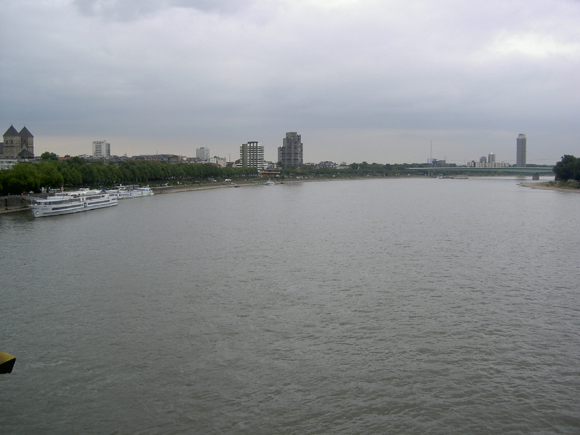 Der Rhein in Köln